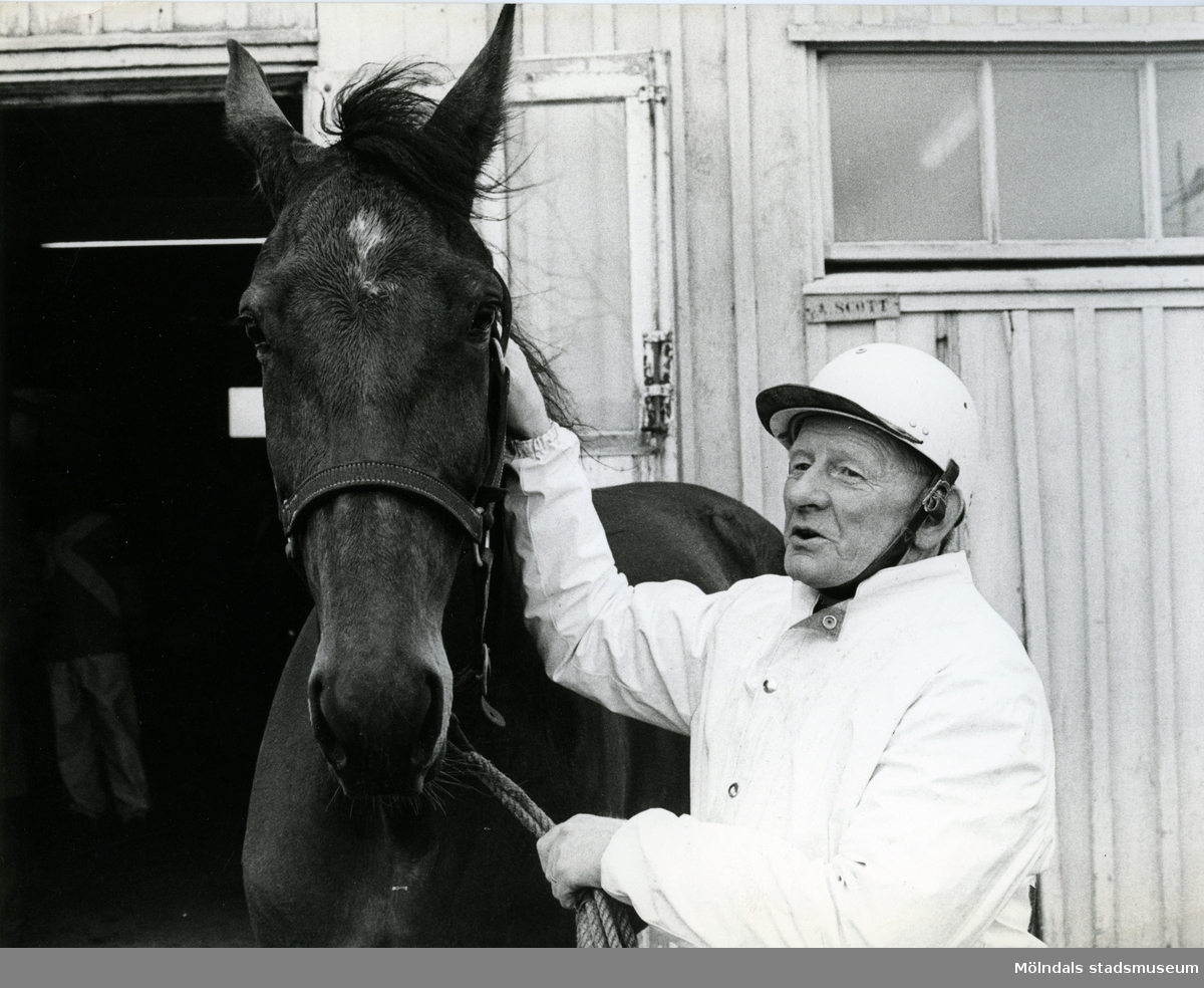 Algot Scott utanför sitt stall 1968, välkänd travtränare stationerad på Åby. Blandade bilder inslamlade i samband med dokumentation av Åby Stallbacke och Stallgårdarna 2015.